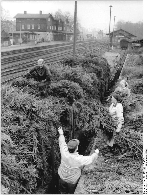 Hildburghausen, Verladen von Weihnachtsbäumen ADN-ZB Schaar 27.11.74 pe Bez. Suhl: Für Berliner sind die Weihnachtsbäume bestimmt, die in Hildburghausen in Container verladen werden. Fast 30.000 Fichten werden in diesem Jahr vom Staatlichen Forstwirtschaftsbetrieb Hildburghausen an die DDR-Hauptstadt geliefert.